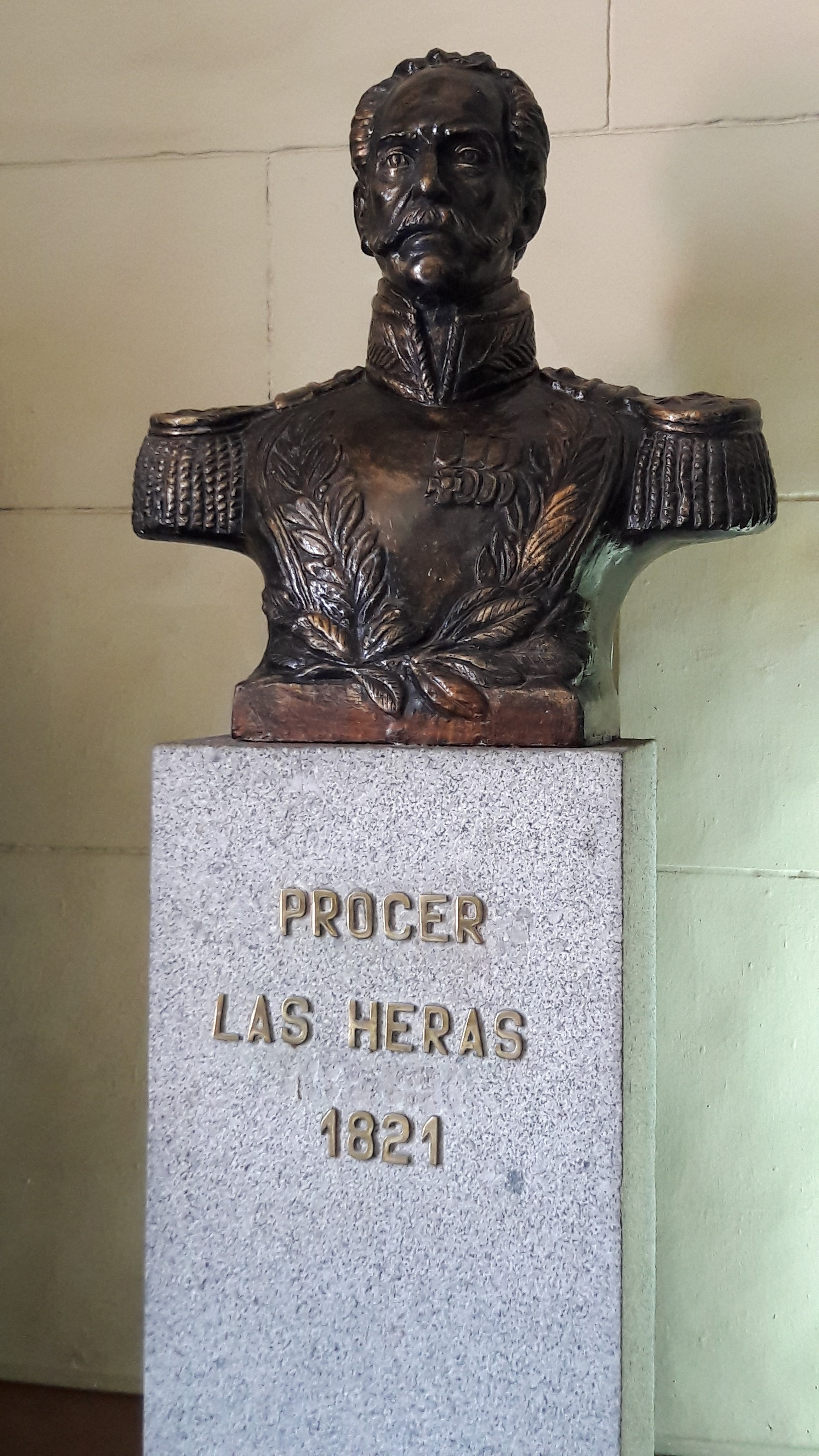 Prócer Las Heras 1821